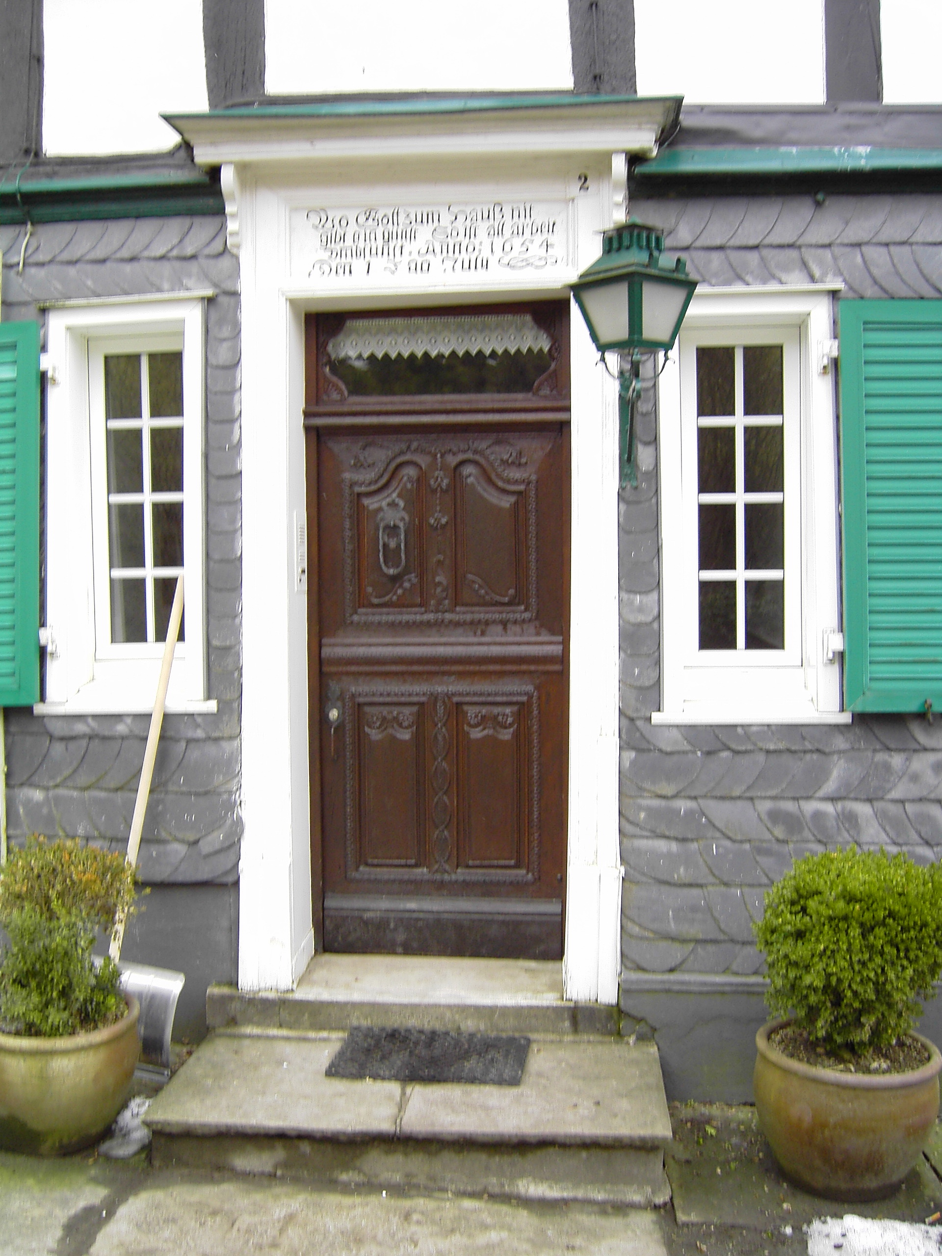 Die Bergermühle im Eifgental 2010